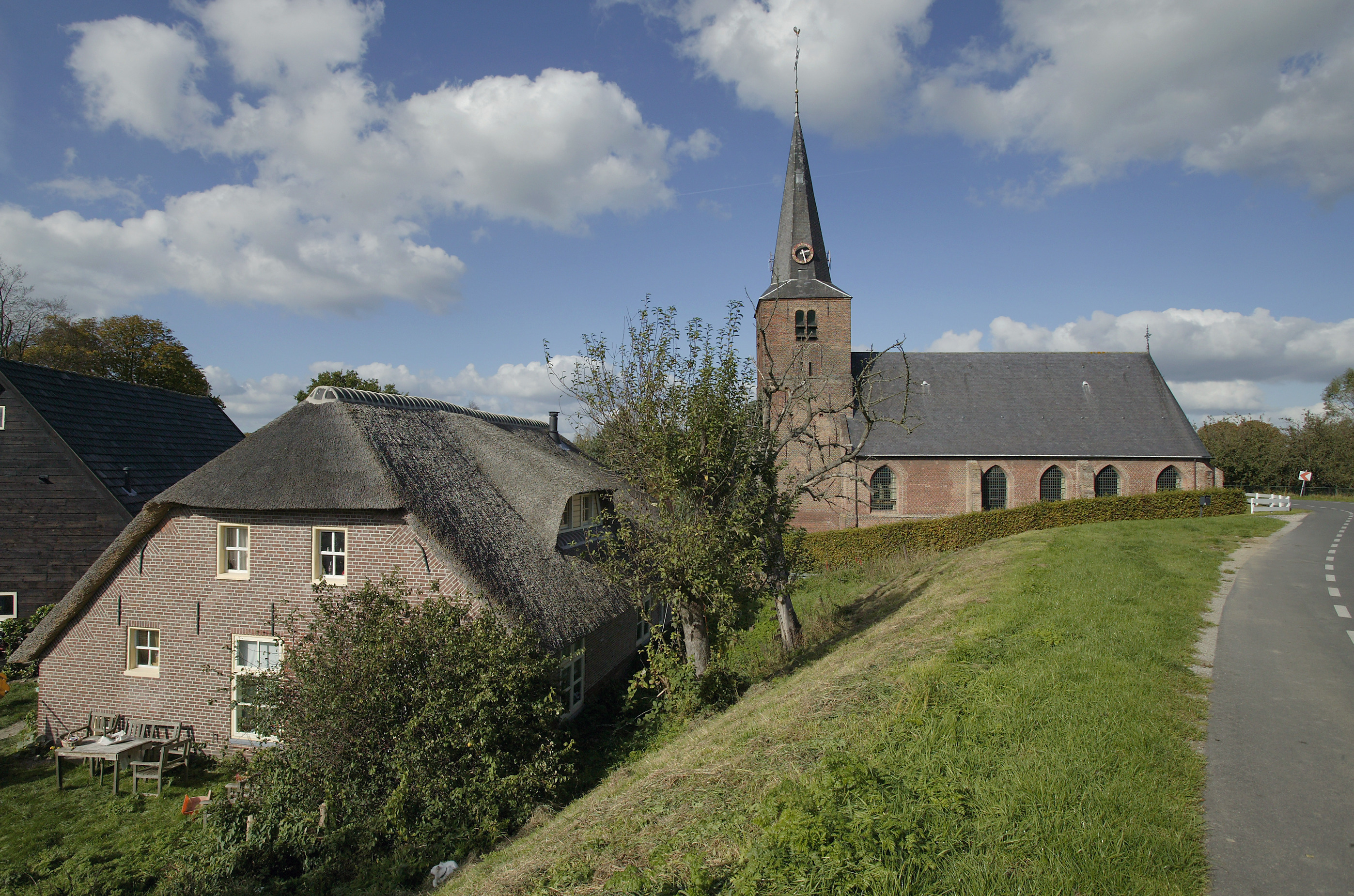 Cultuurlandschap: Zicht op Hervormde kerk langs de dijk